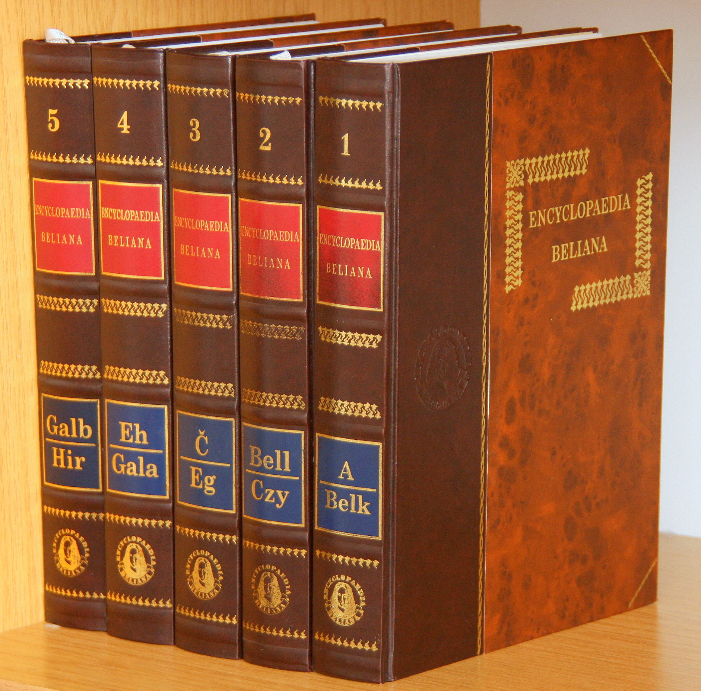 slovenská všeobecná encyklopédia